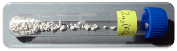 Fosforečnan zinečnatý - Zn3(PO4)2